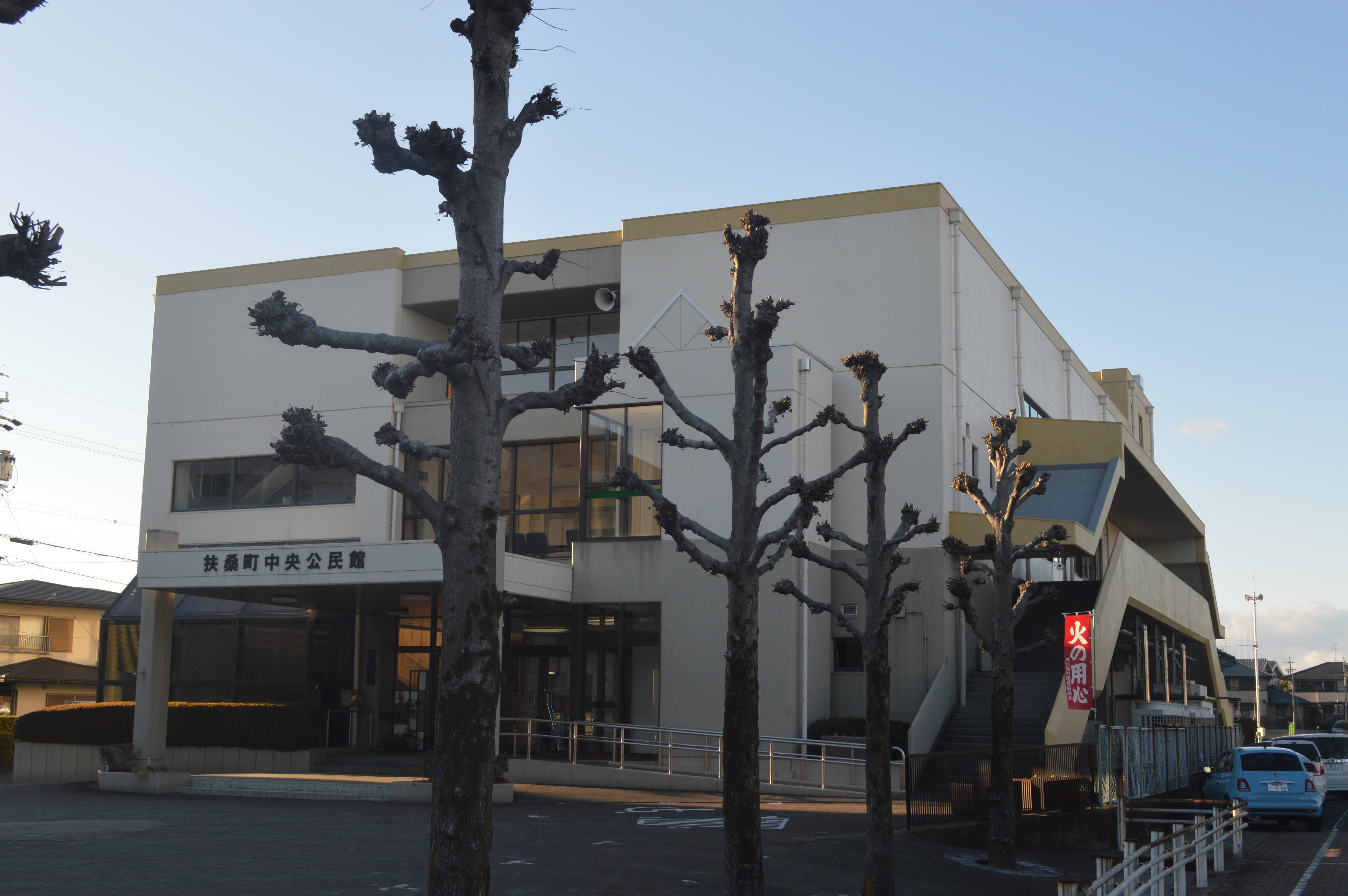 愛知県丹羽郡扶桑町にある扶桑町中央公民館。